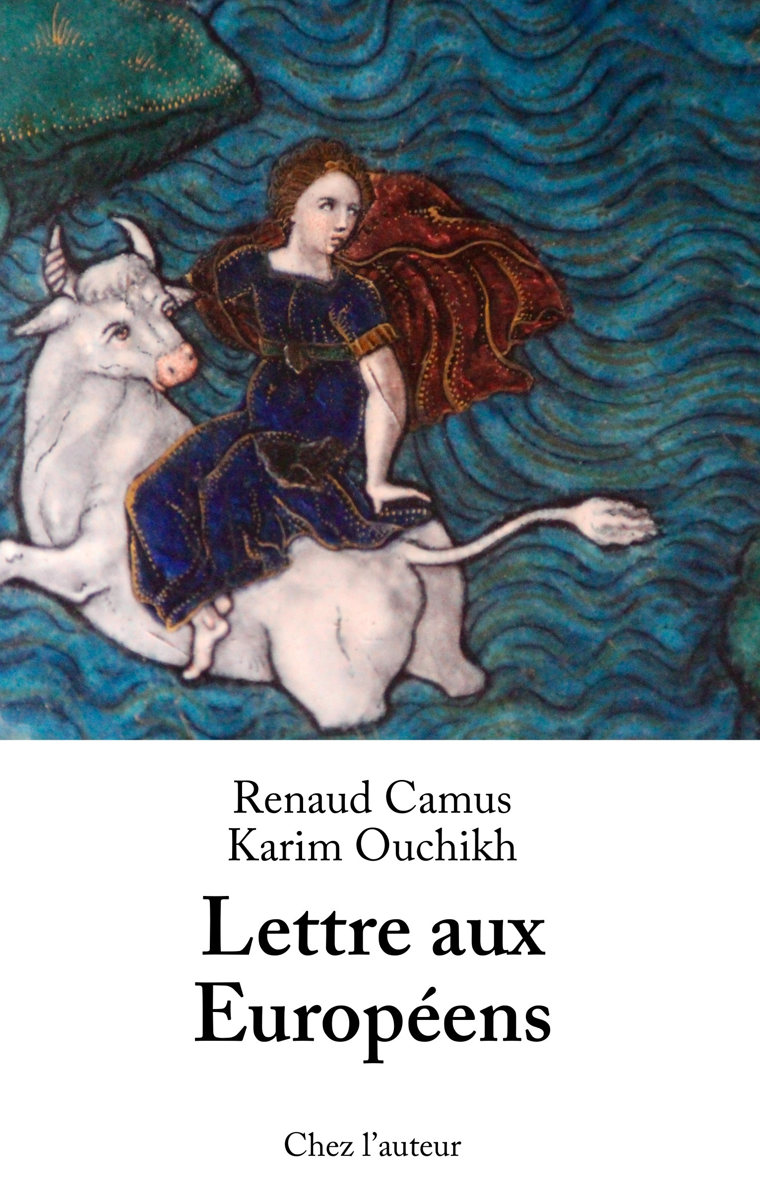 Couverture de l'ouvrage Lettre aux Européens (2019), écrit par Renaud Camus et Karim Ouchikh.